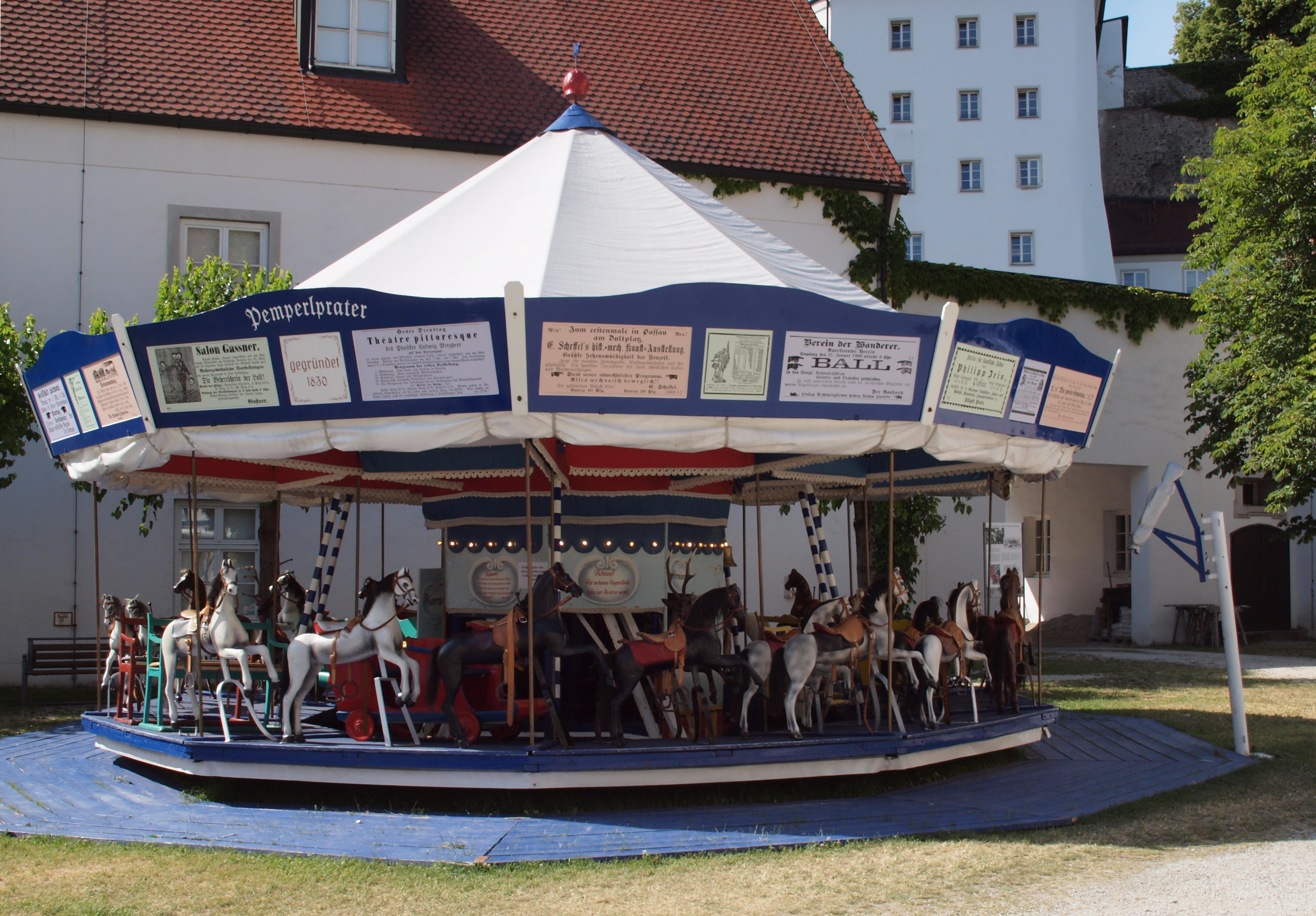 Das Karussell »Pemperlprater« im äußeren Burghof der Veste Oberhaus 2014.